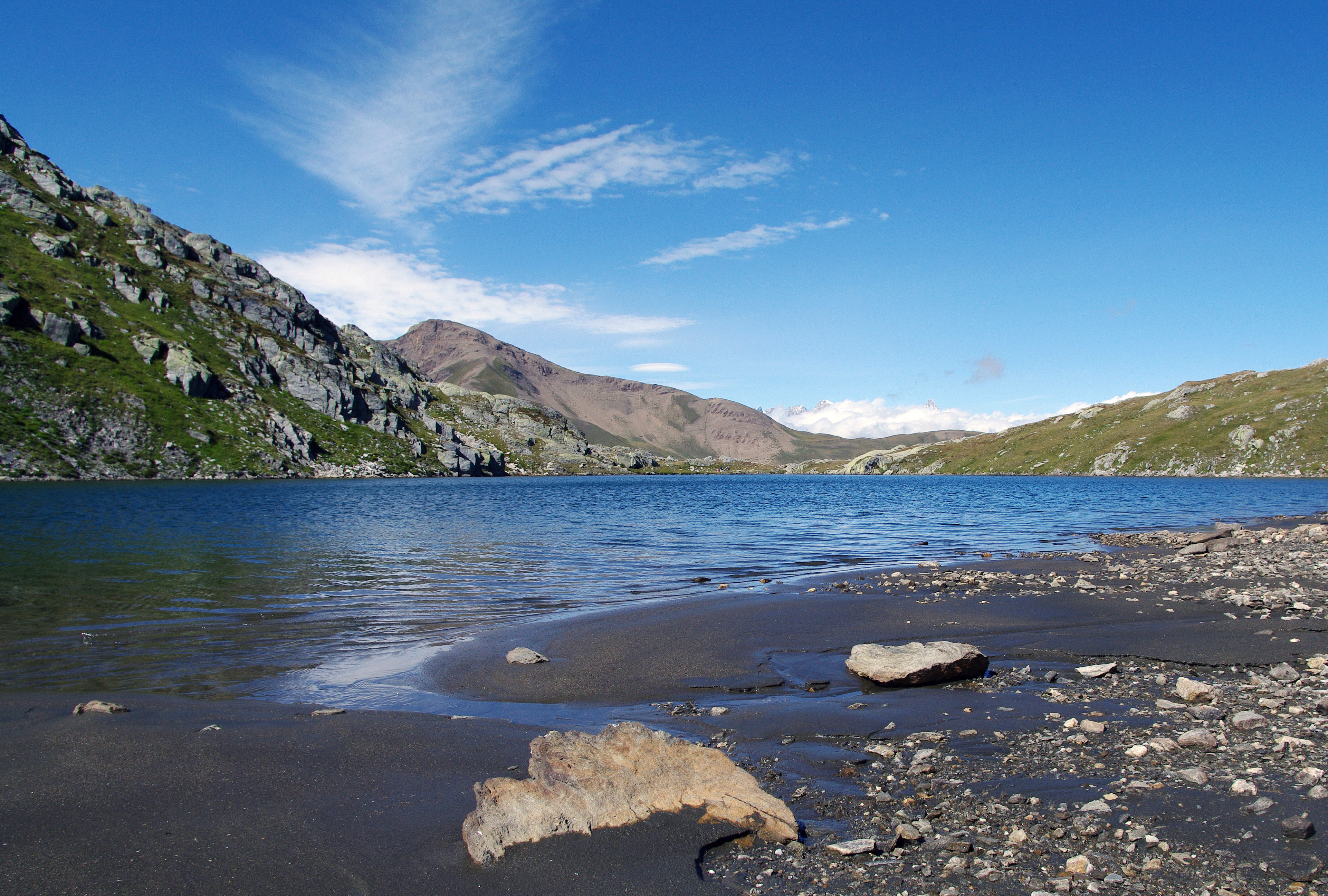 Ort: Blausee. Foto: Brigitte Wolf